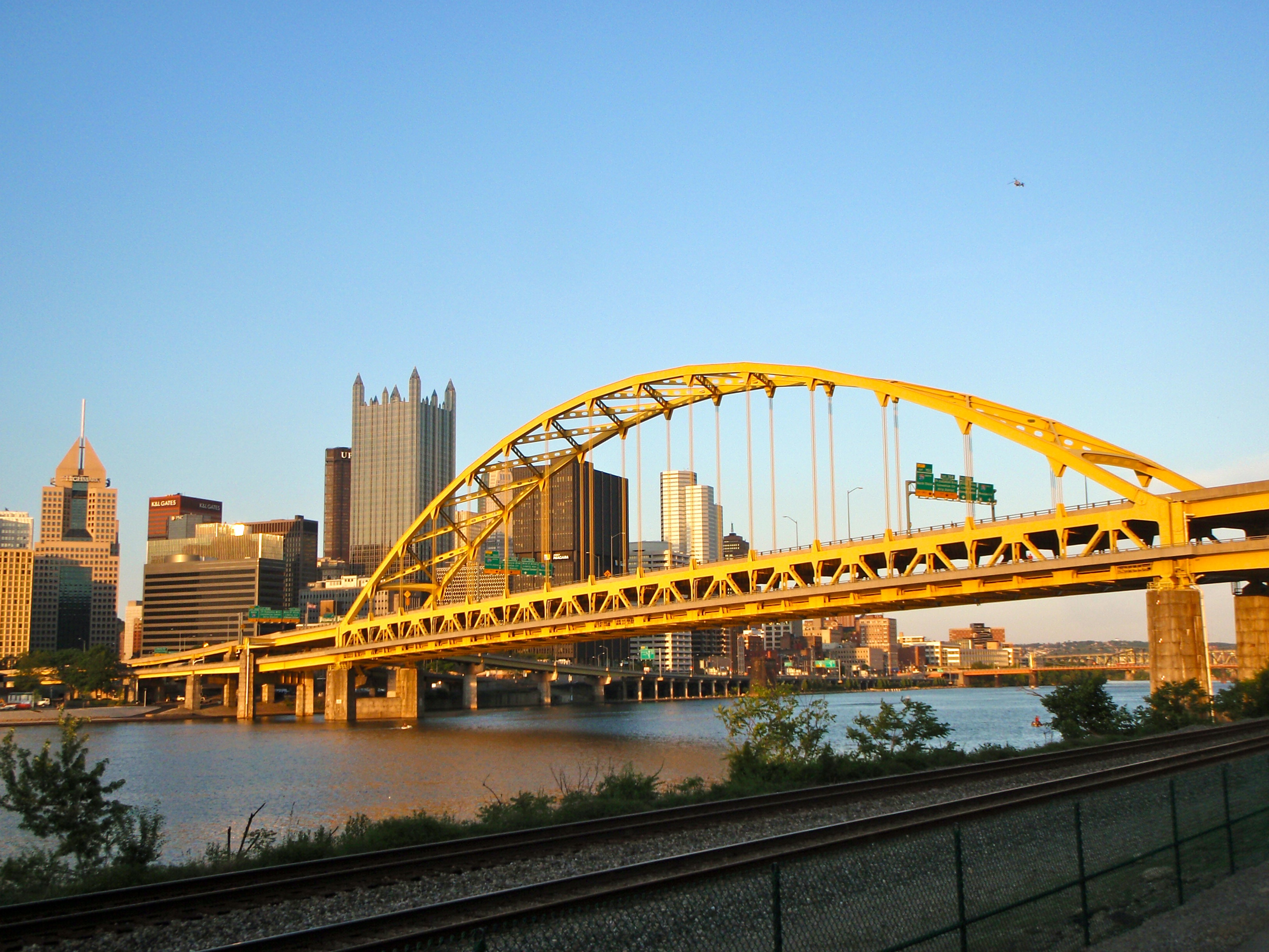 Fort Pitt Bridge